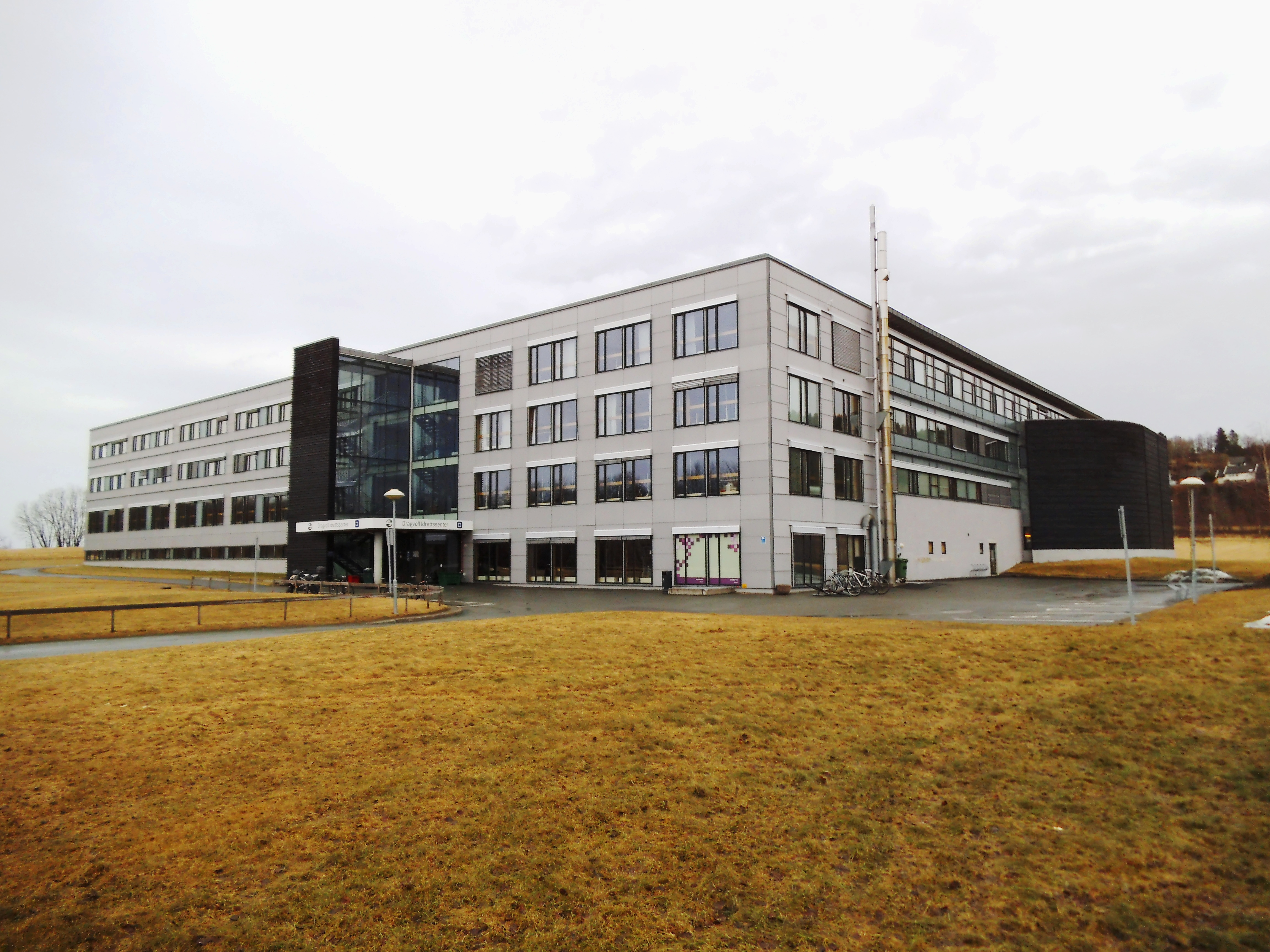 Idrettssenteret på NTNU Dragvoll. Ligger øst for hovedbygget.